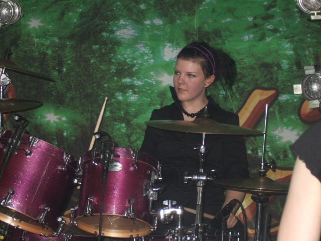 Laura, die Schlagzeugerin von Indica